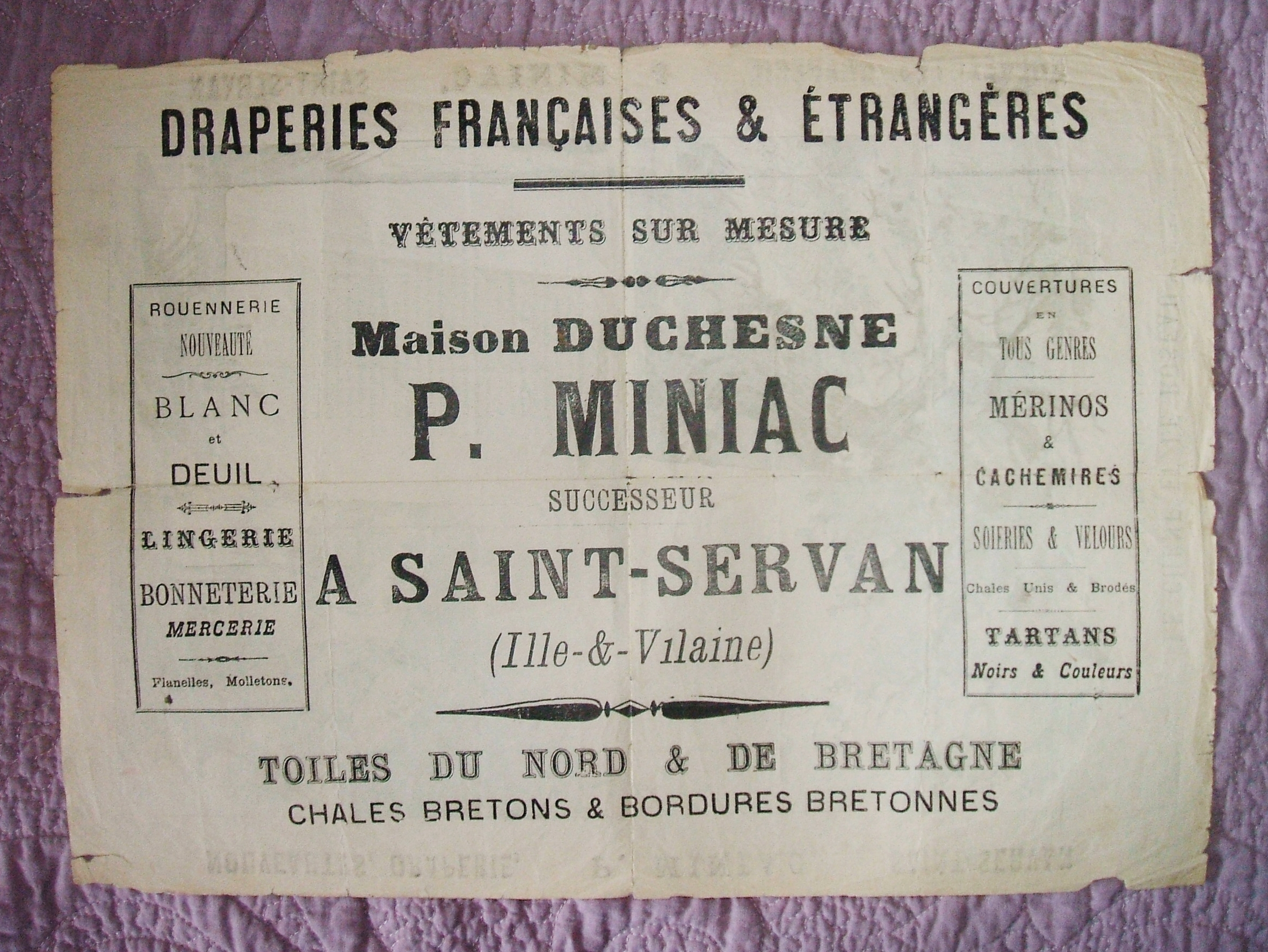 Réclame du négoce de Paul Miniac (successeur Anne-Marie Duchesne, sœur de l'académcien Louis Duchesne), établi jusqu'en fin 1899 place Bouvet à Saint-Servan-sur-Mer (aujourd'hui Saint-Malo), Ille-et-Vilaine, à l'angle avec la rue Georges Clémenceau. Le magasin qui lui a succédé est un Félix Potin, en 1900. Collections successives : Paul Miniac (1851-1936), Louis Miniac (1887-1952), Marie Miniac née Sarciaux (1897-1982), Paul Miniac (1927-1995).